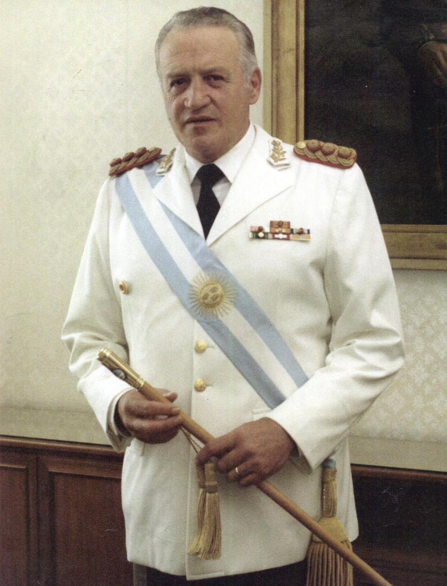 Retrato Oficial de Leopoldo Fortunato Galtieri, tras asumir como presidente de facto.